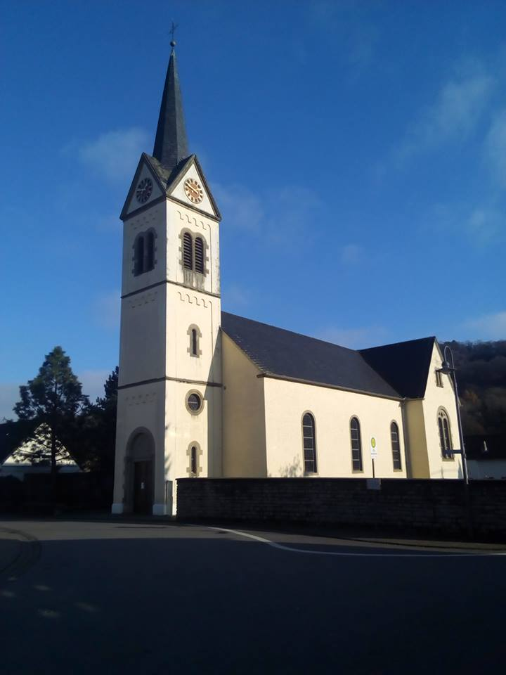 Frontalansicht